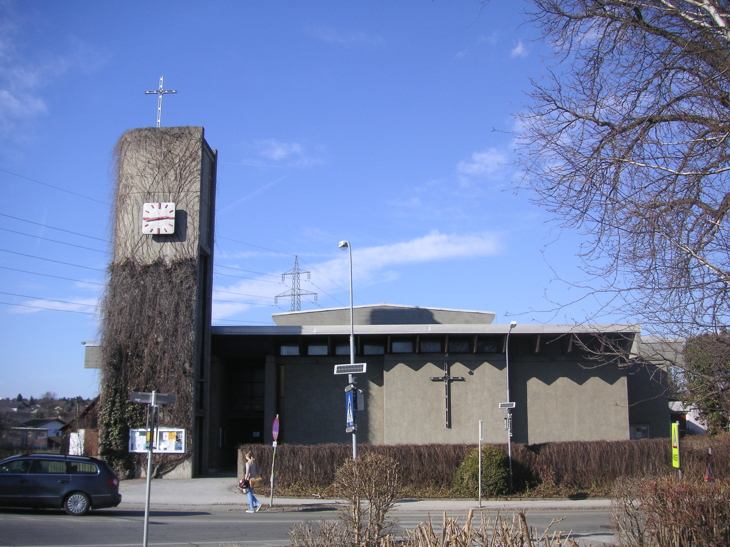 Kath. Pfarrkirche hl. Franz Xaver